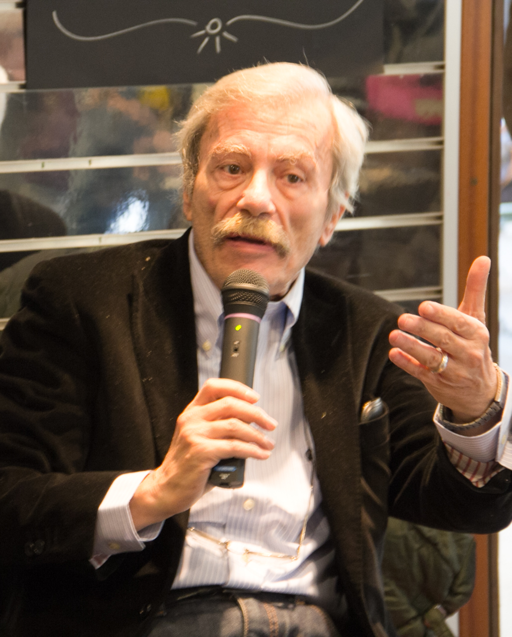 Eugenio Baroncelli